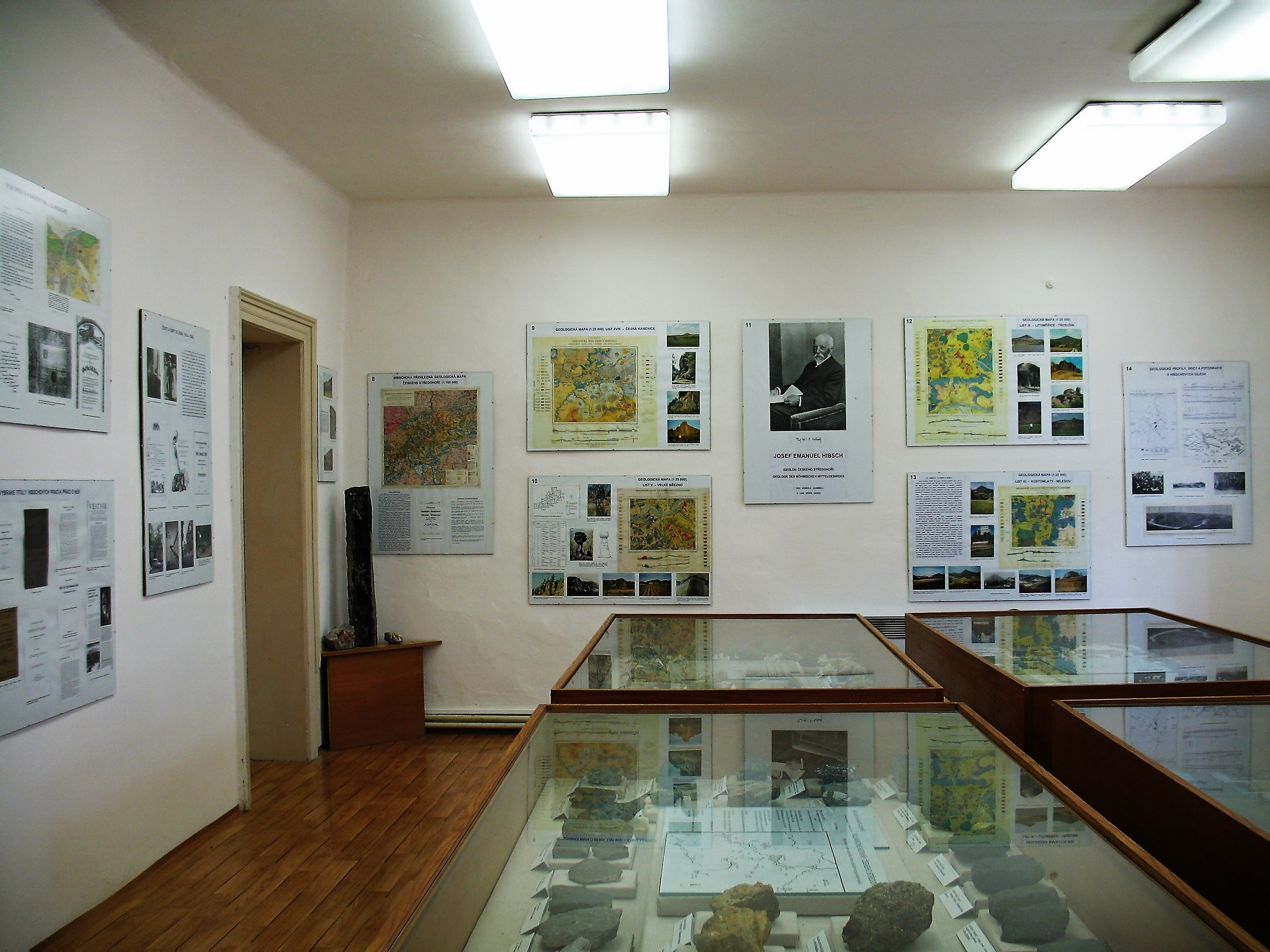 Mineralogické muzeum J. E. Hibsche v Homoli u Panny - interiér muzea